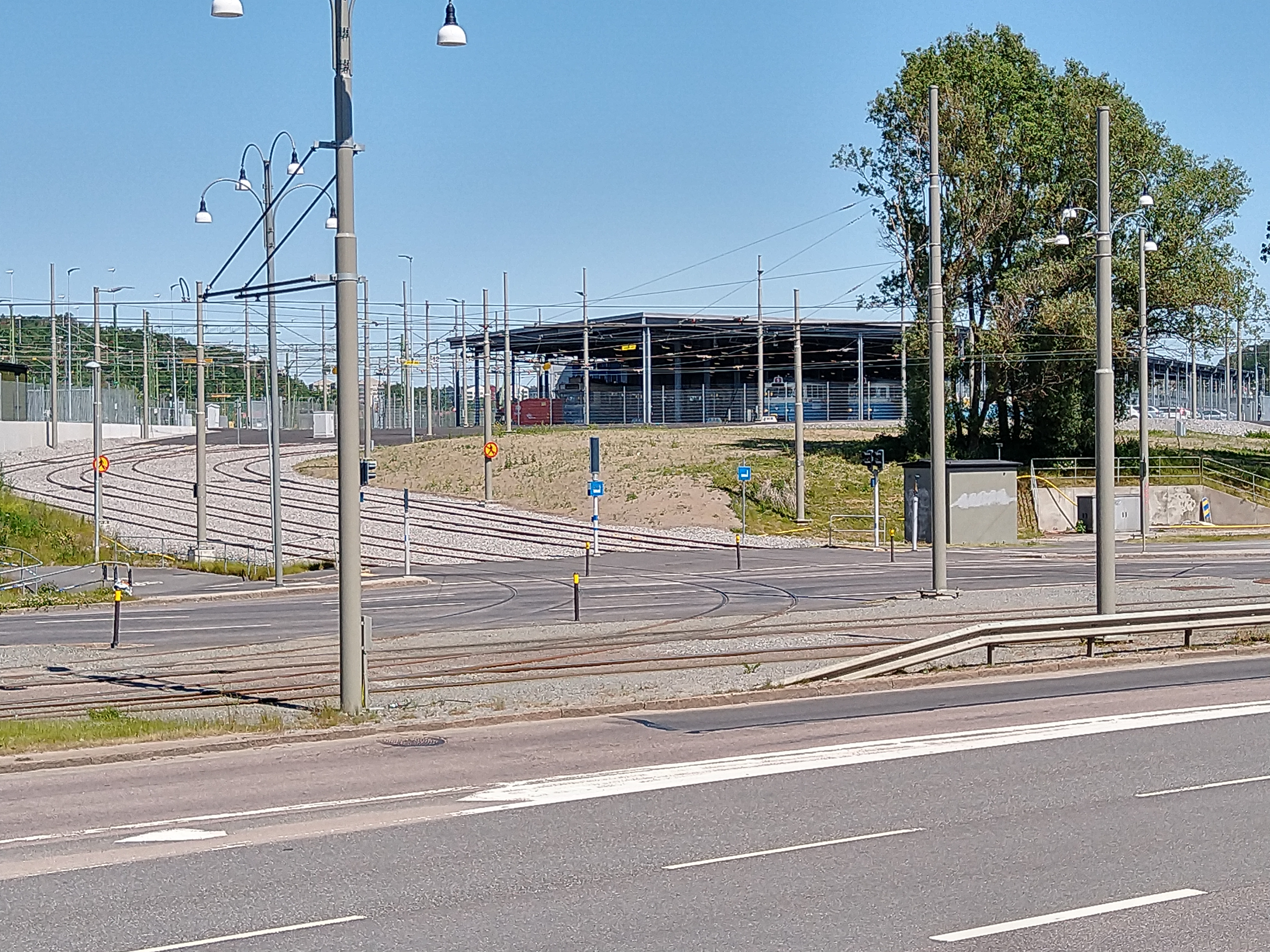 Vagnhallen Ringön, Göteborg. Infarten från sydväst. Spårvagnshall.